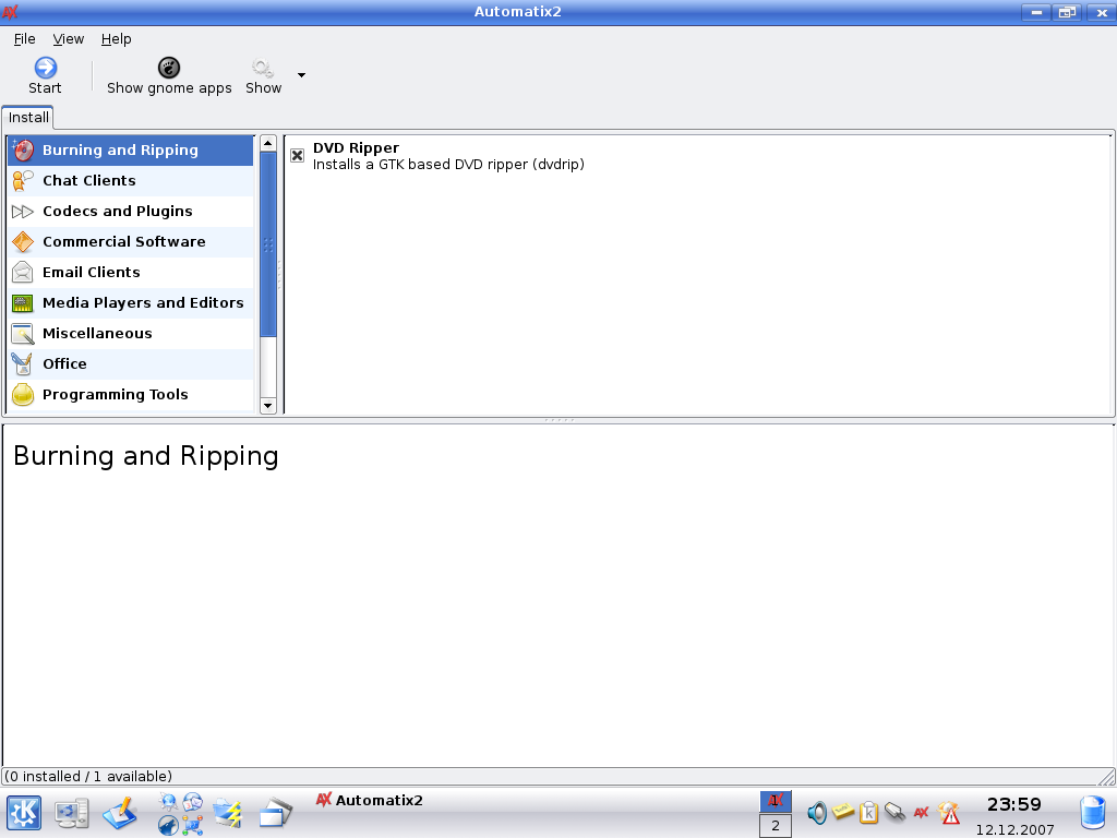 Automatix2 2.0.6 en Kubuntu 7.10